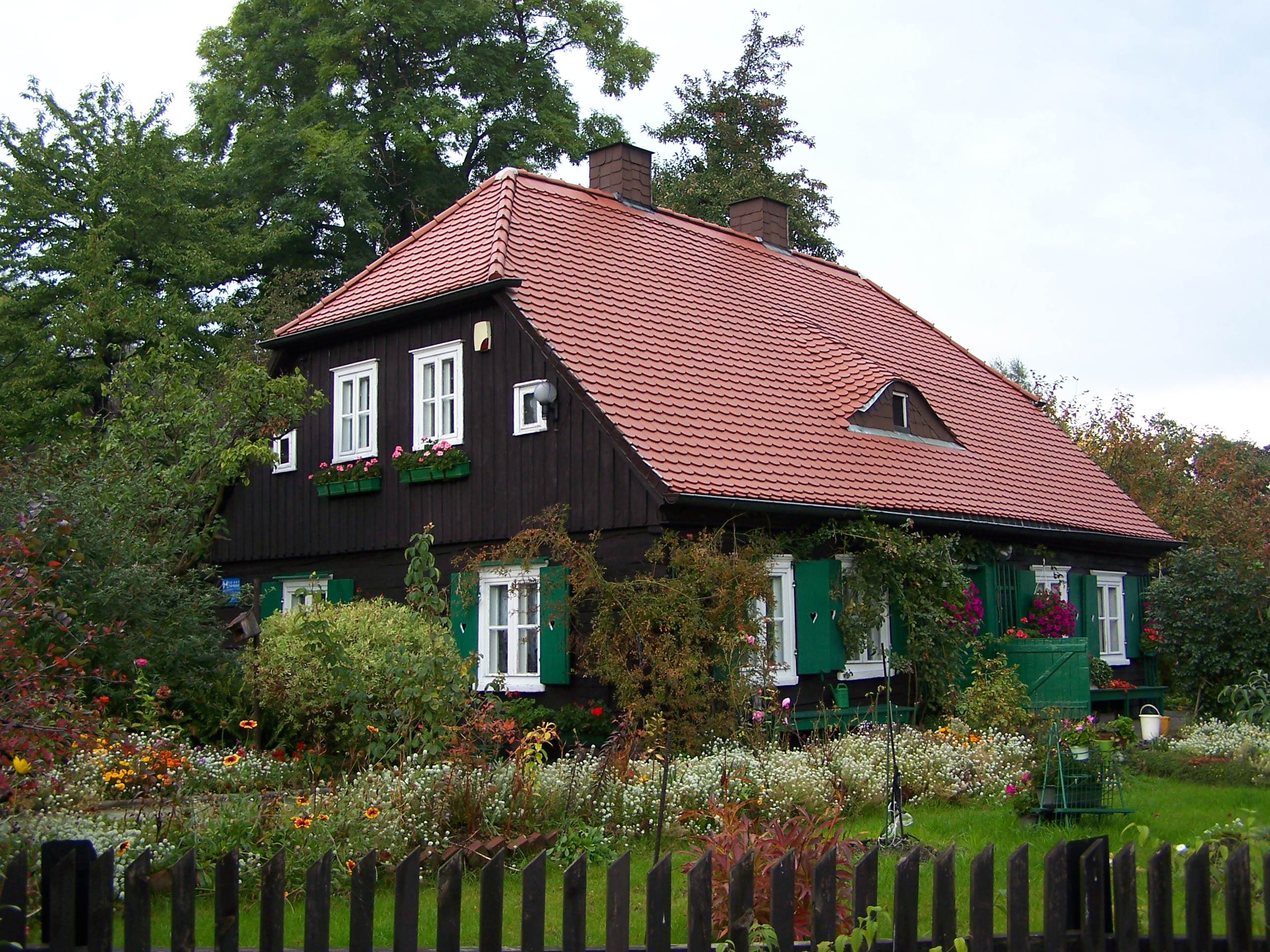 Domek Matki Ewy (Waleska Anna Katarzyna Adelajda Maria Elżbieta Ewa von Tiele Winckler) w Miechowicach.